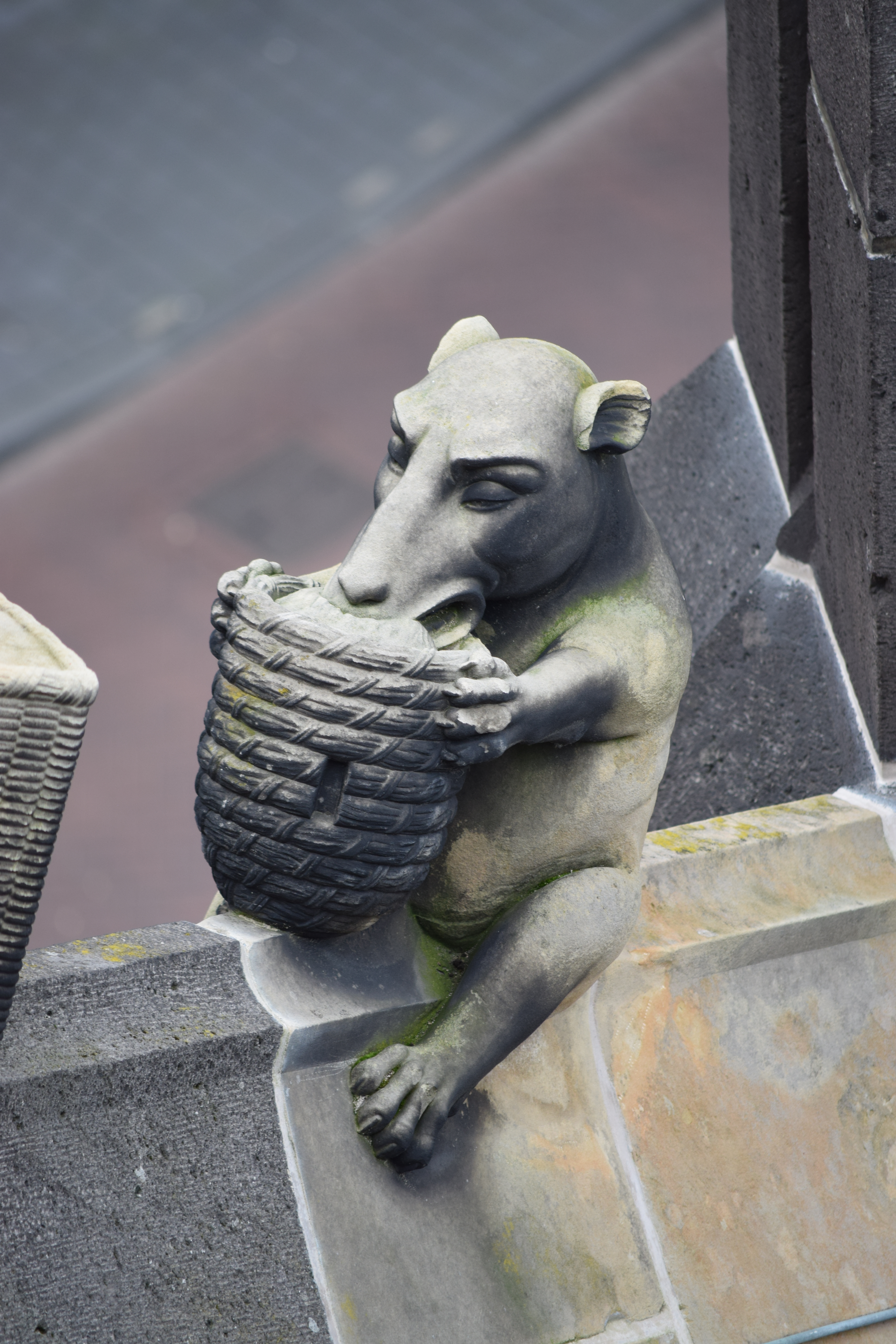 Luchtboogbeeld Sint Jan Den Bosch